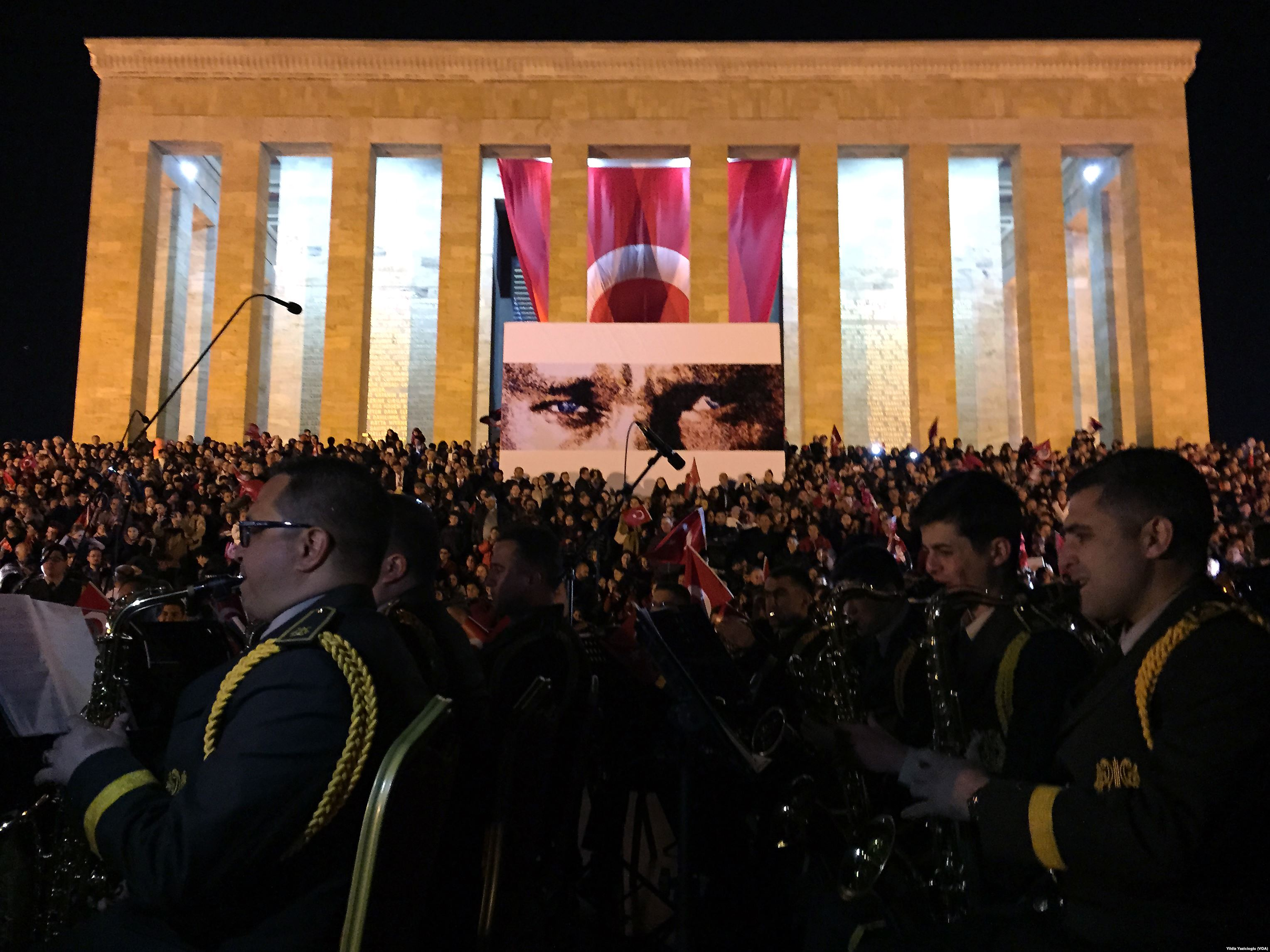 Çanakkale Savaşı'nın 100. yılı anma etkinlikleri çerçevesinde Anıtkabir'de gerçekleştirilen törenden bir enstantane.